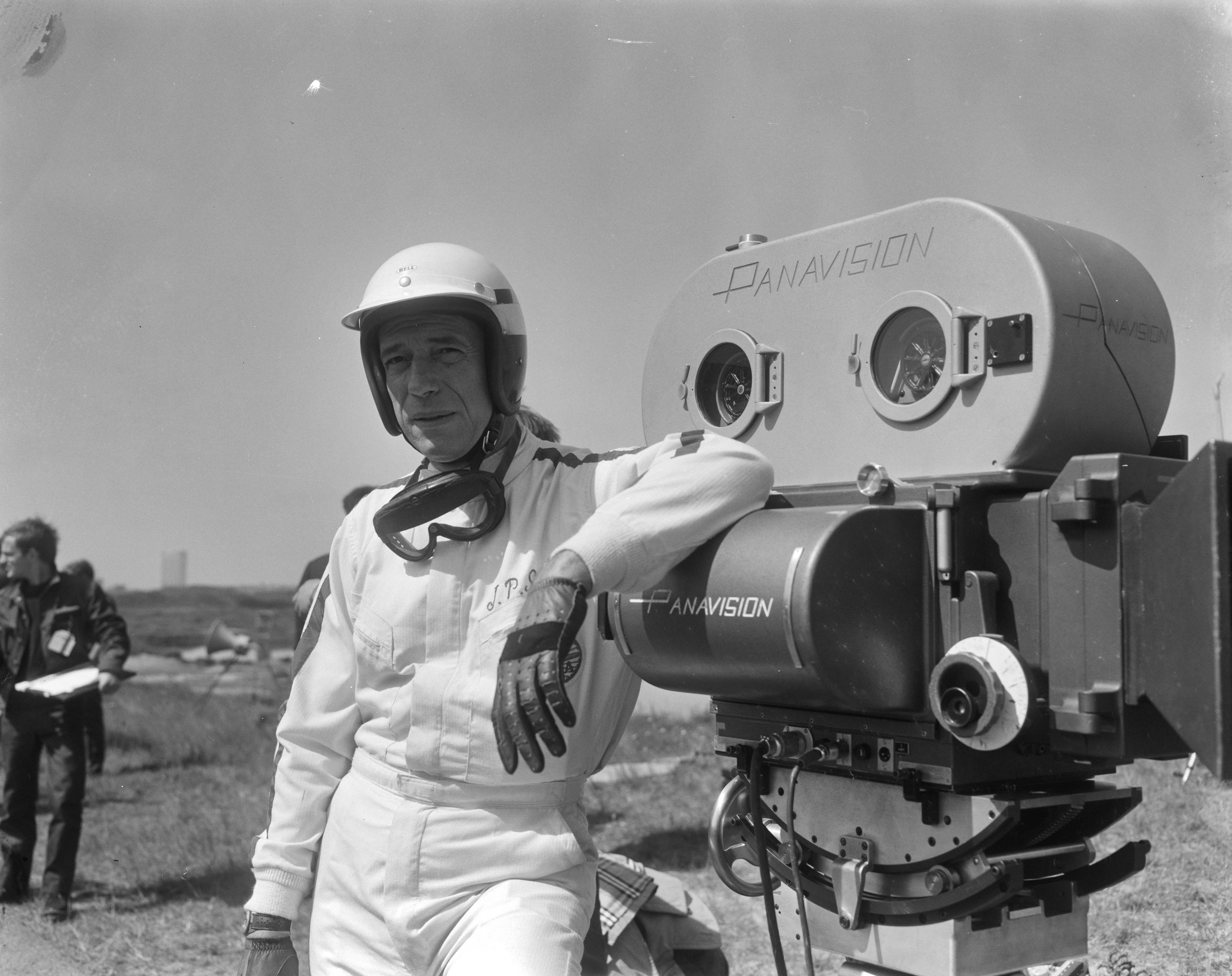 Cineramafilm "Grand Prix", filmopnames te Zandvoort, Yves Montand [als coureur Jean Paul Sarti] bij de filmcamera